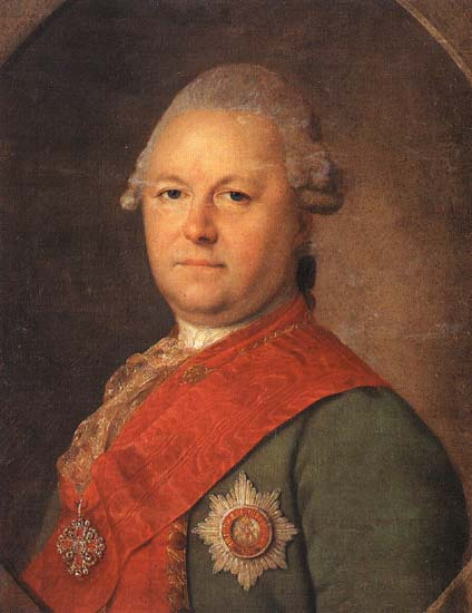 Glebov_Alexander_Ivanovich (1722—1790)